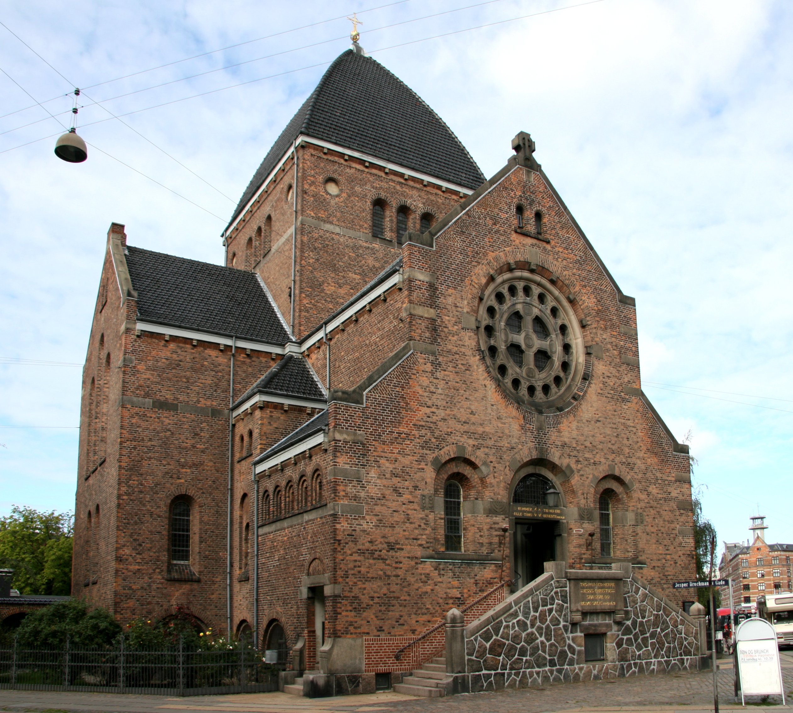 Brorsons Kirke in Copenhagen, Denmark.